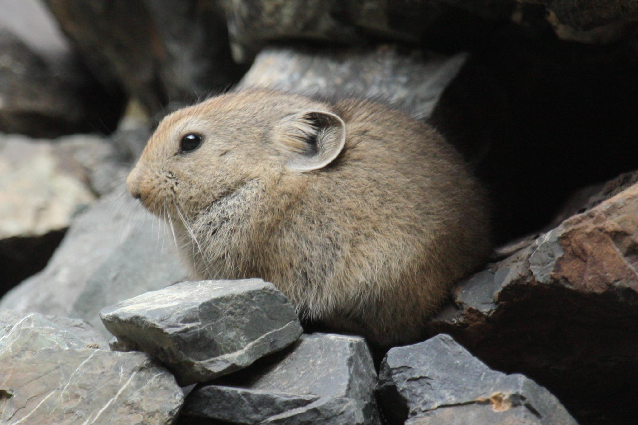 aka Mongolian Pika